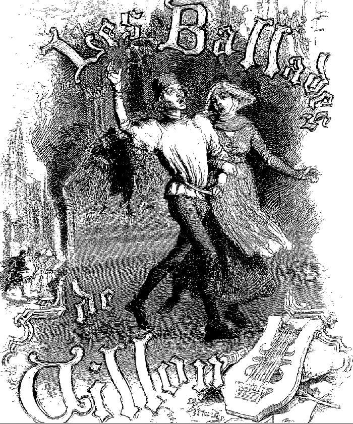 Edition de 1896 des Ballades de Villon. Illustrations de Gerardin.